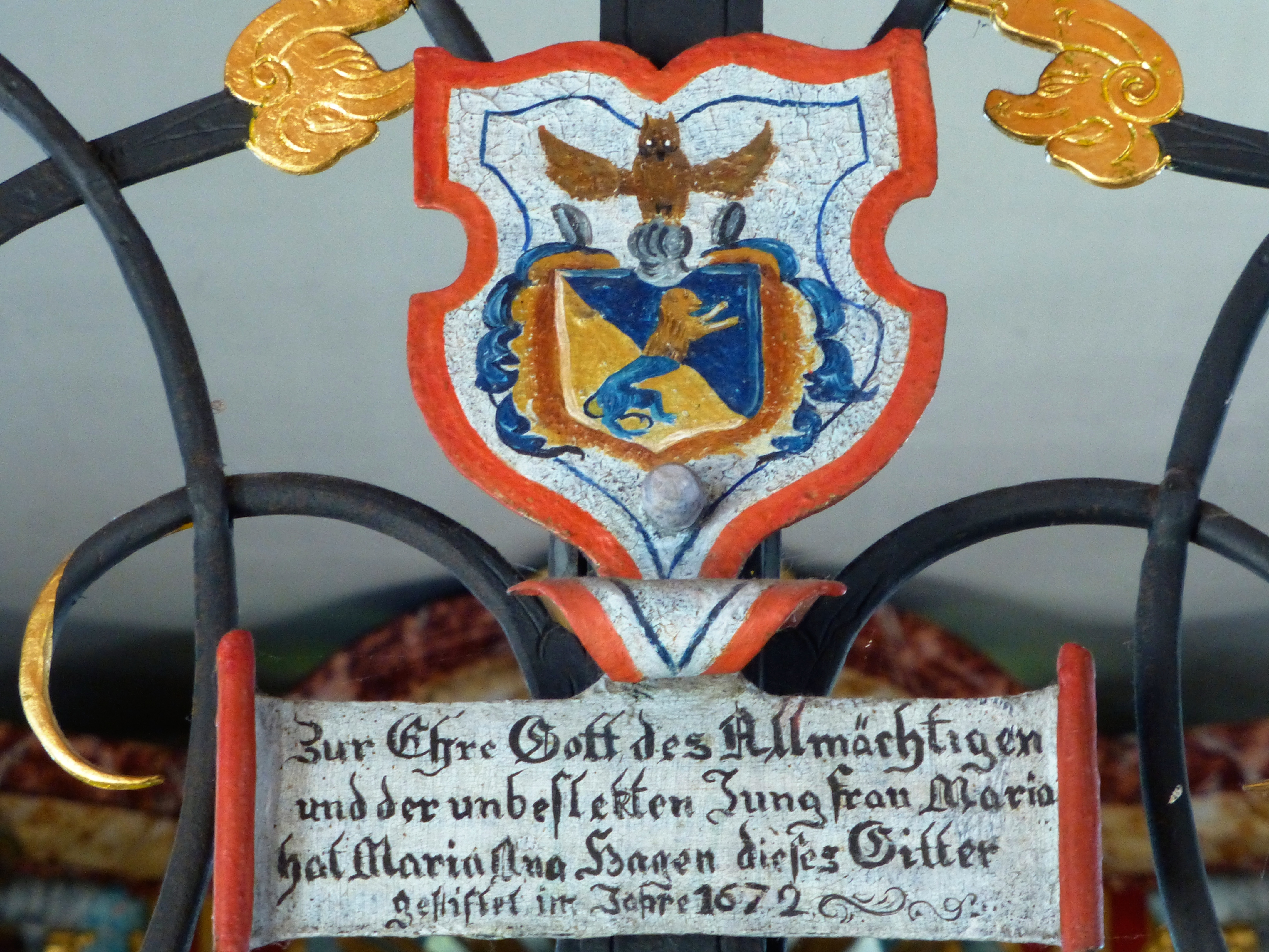 Stifterwappen und Inschrift am Chorgitter der Lorettokapelle in Lustenau